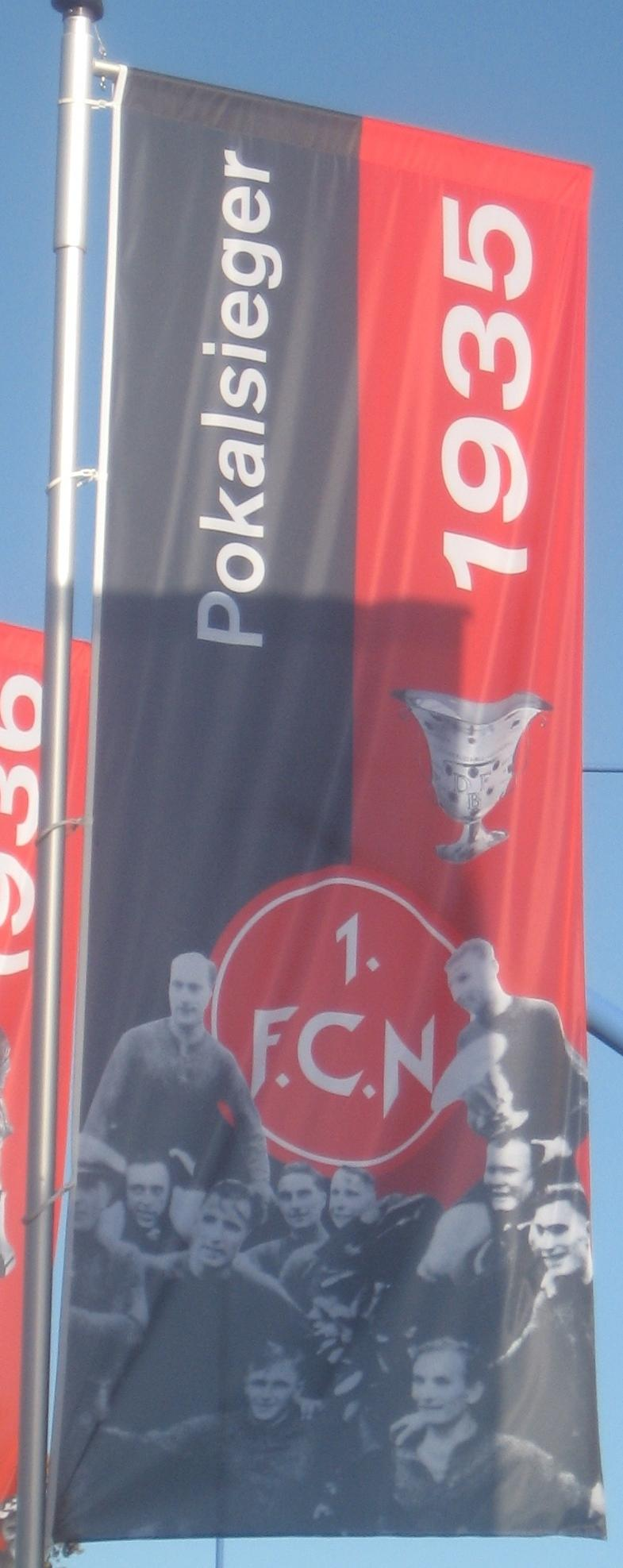 Fahne des 1. FC Nürnberg mit der Jahreszahl des Gewinnes der Deutschen Meisterschaft.